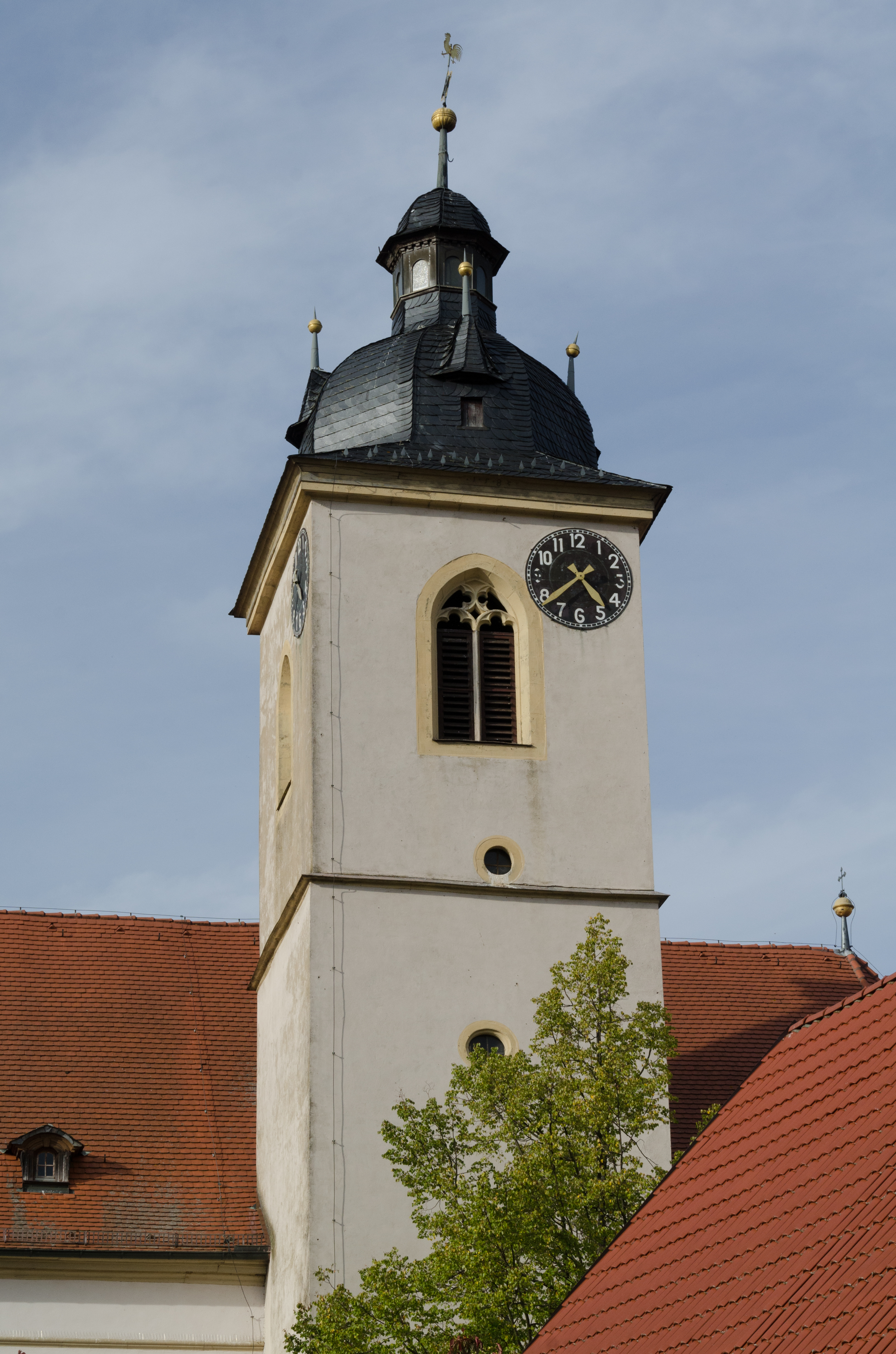 Eisenheim, Untereisenheim, Kath. Pfarrkirche